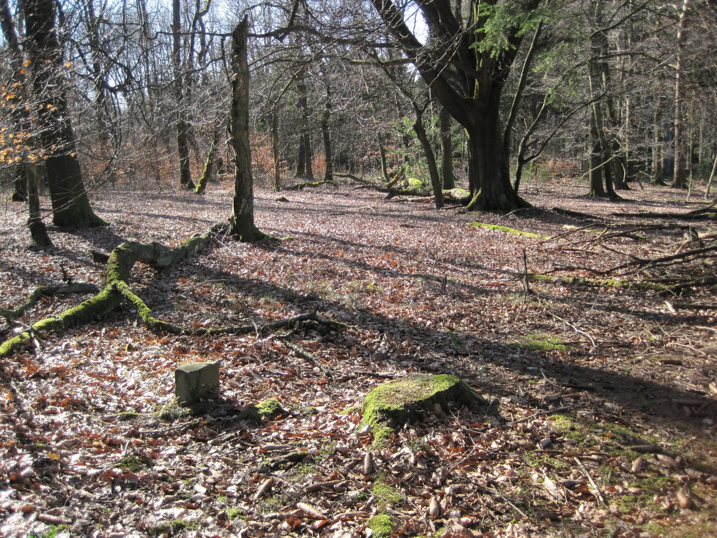 Lage der Station 47 der Telegrafenlinie Preußischer optischer Telegraf auf dem Rattenberg bei Wermelskirchen: keine Überreste bei Position 51° 8′ 27″ N, 7° 16′ 2″ O. Siehe auch Liste_der_Stationen_des_preußischen_optischen_Telegrafen